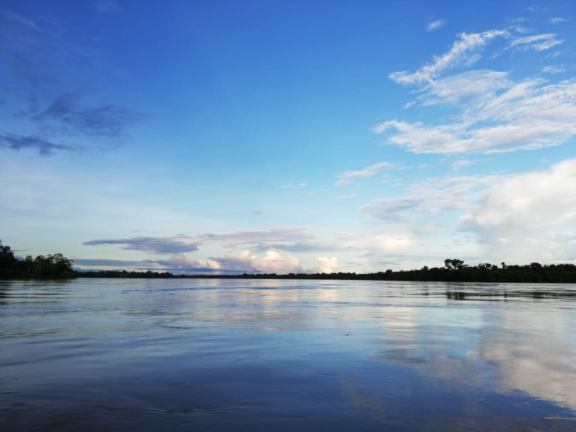 Aunque el rio Caqueta es un río relativamente largo, se ha dificultado su navegación ,en este rio de paz se respira la tranquilidad. Esta fotografía fue tomada en un área protegida de Colombia con el código 91407 del RUNAP.